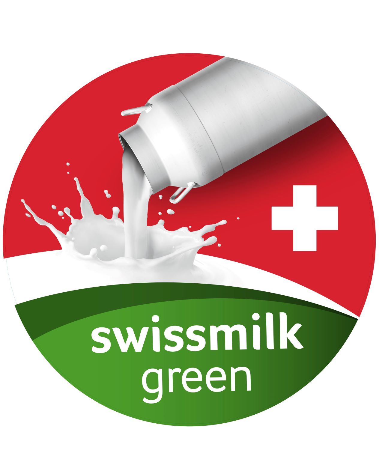 das offizielle Label für den Branchenstandard nachhaltige Schweizer Milch heisst "swissmilk green"